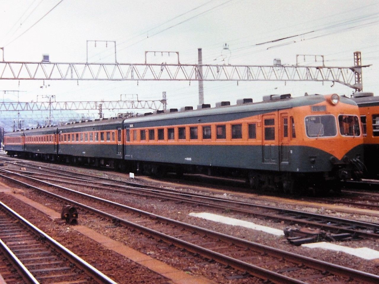 国鉄80系電車 クハ86065 1979年 中津川駅撮影